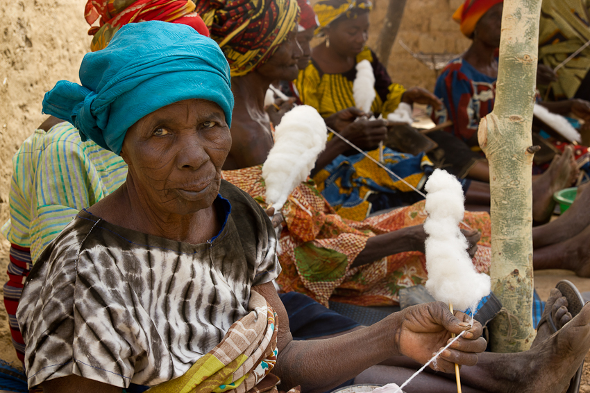 Fileuses de coton dans la région d'Oury This is an image of Cultural Fashion or Adornment from Burkina Faso